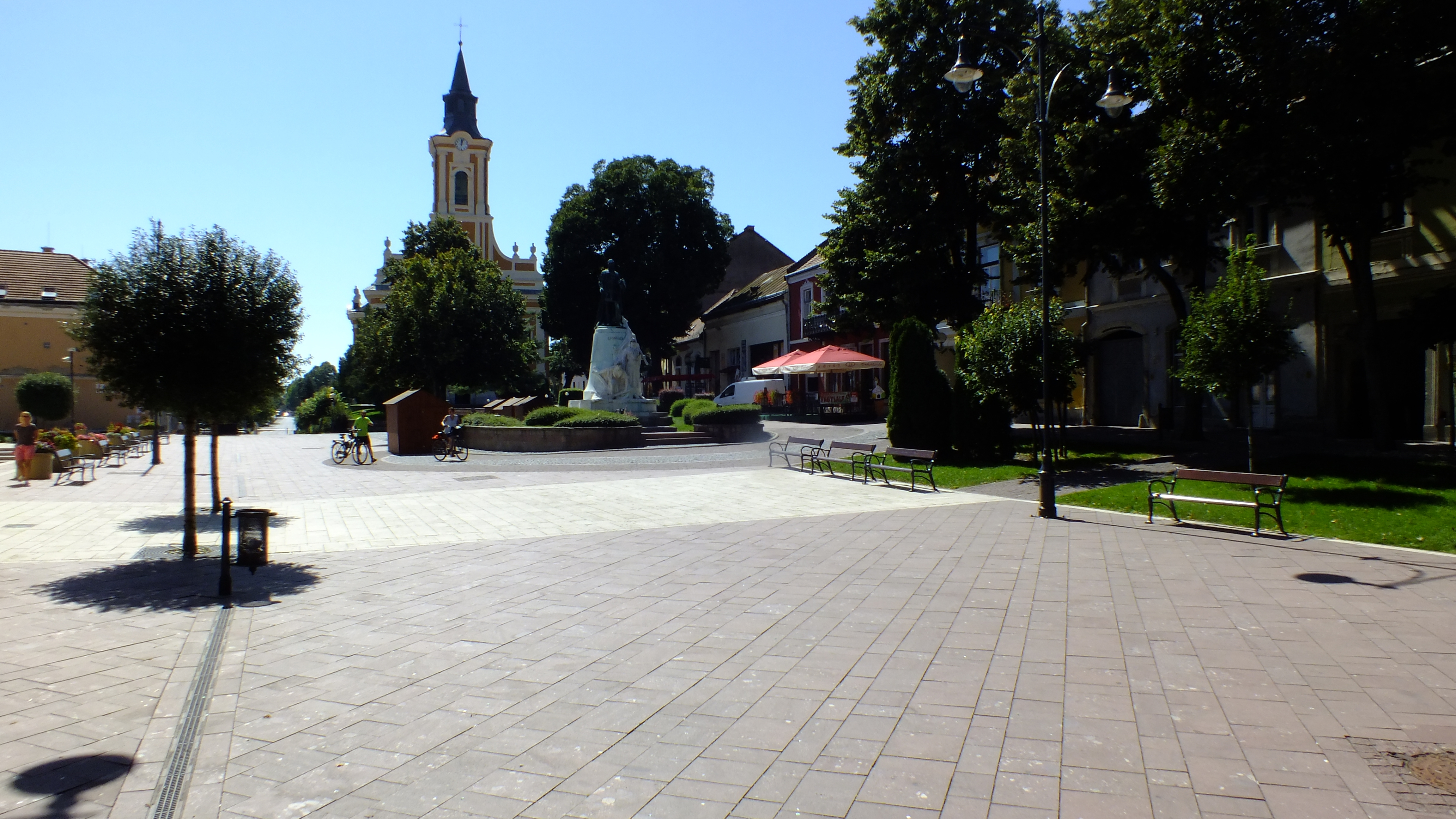 Hlavní náměstí